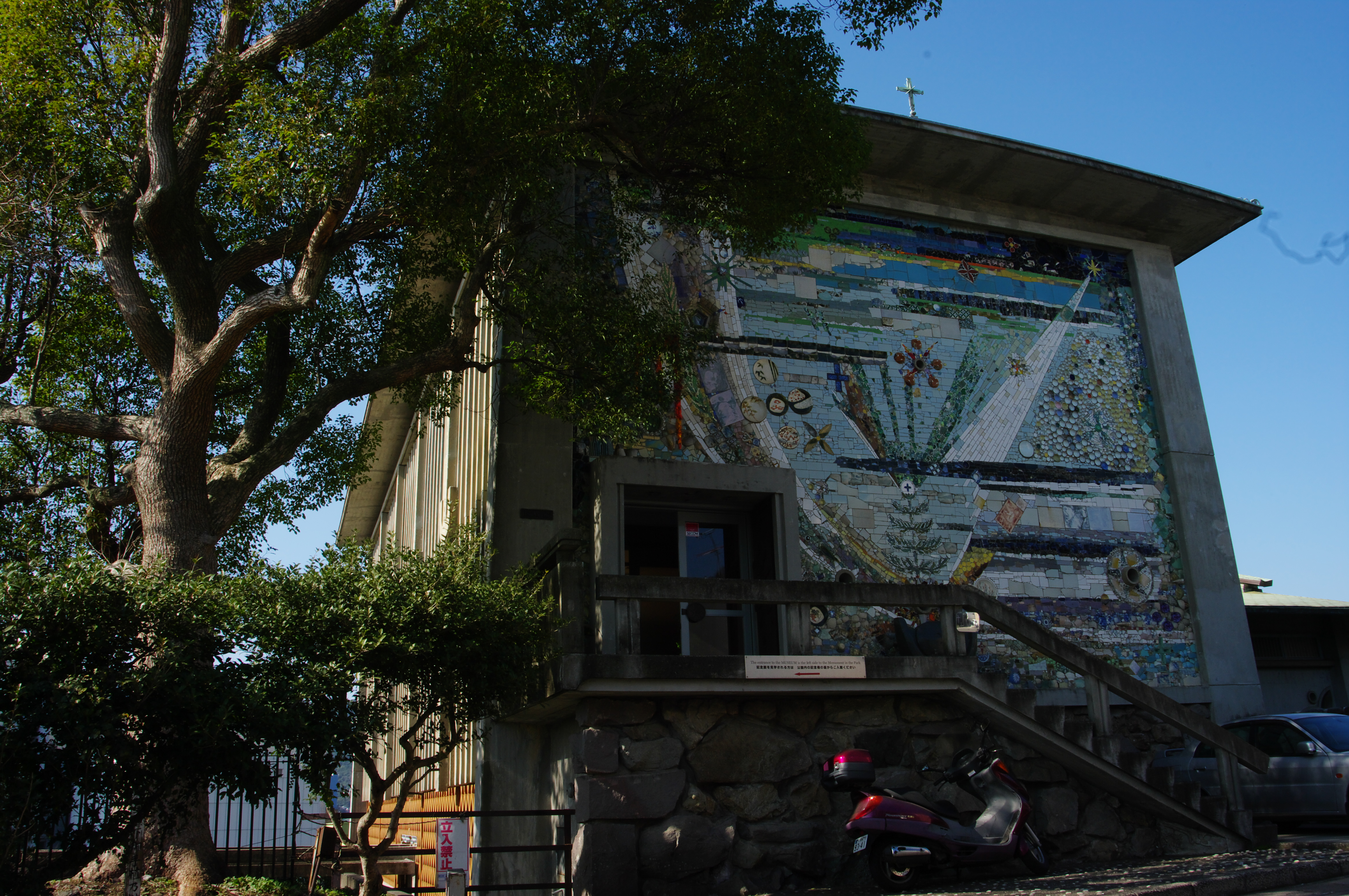 日本二十六聖人殉教地記念館